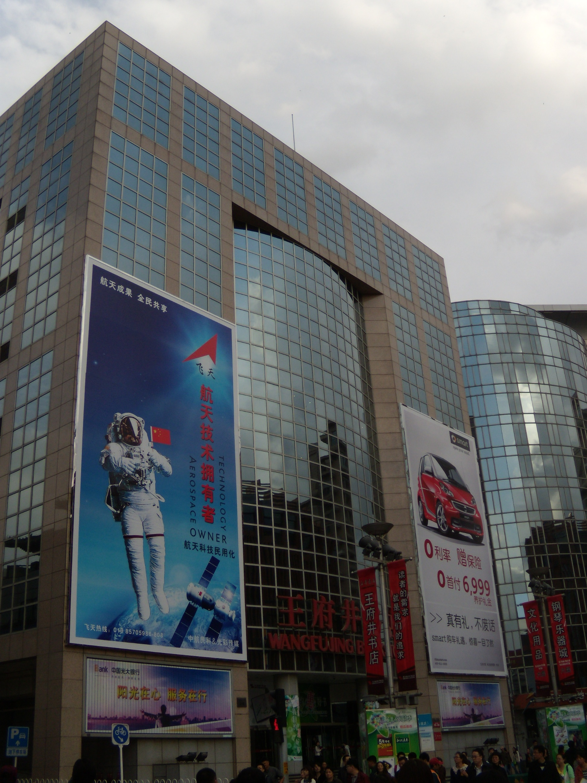 王府井书店，位于王府井大街